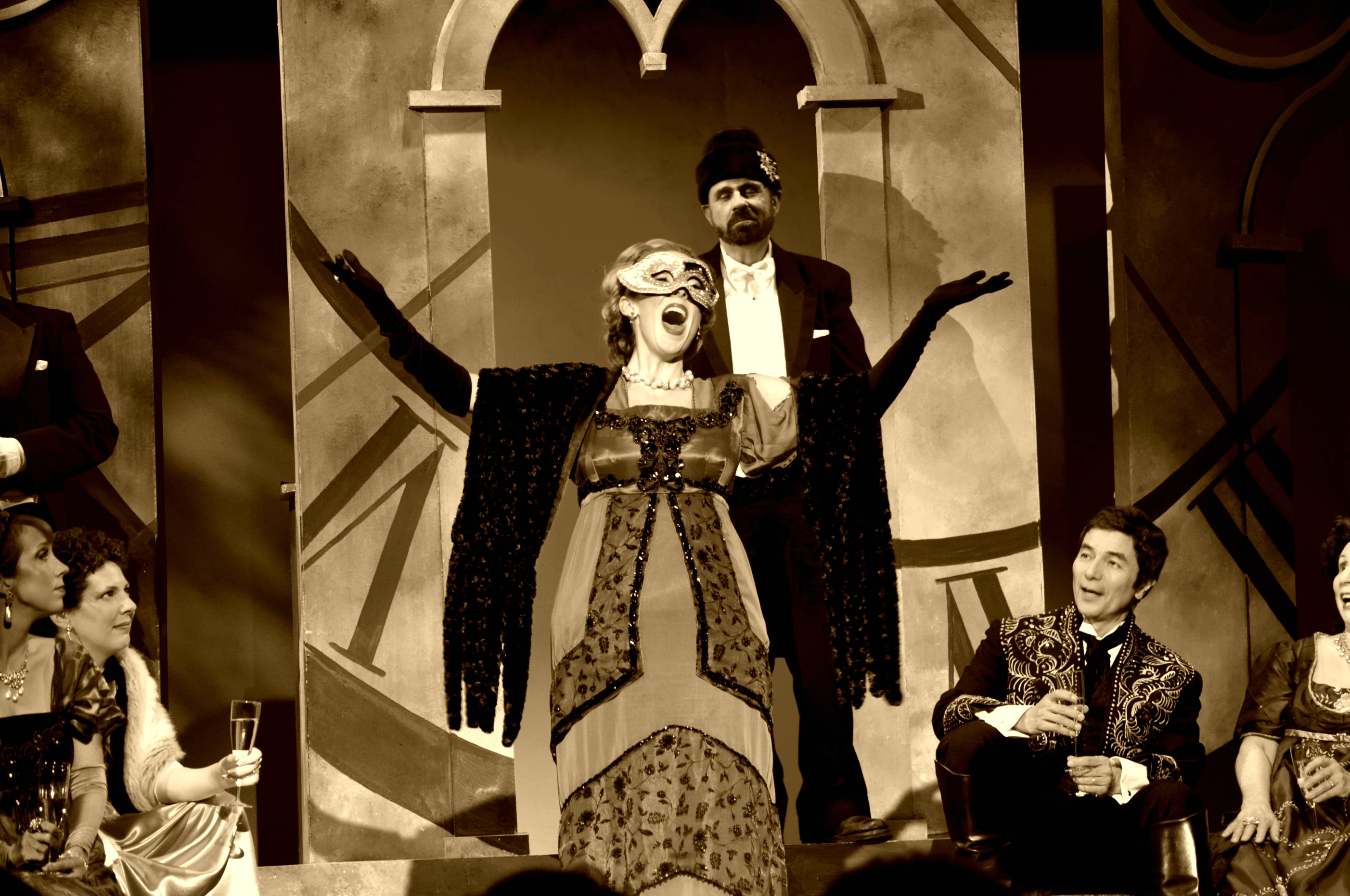 Opera in the Heights Die Fledermaus